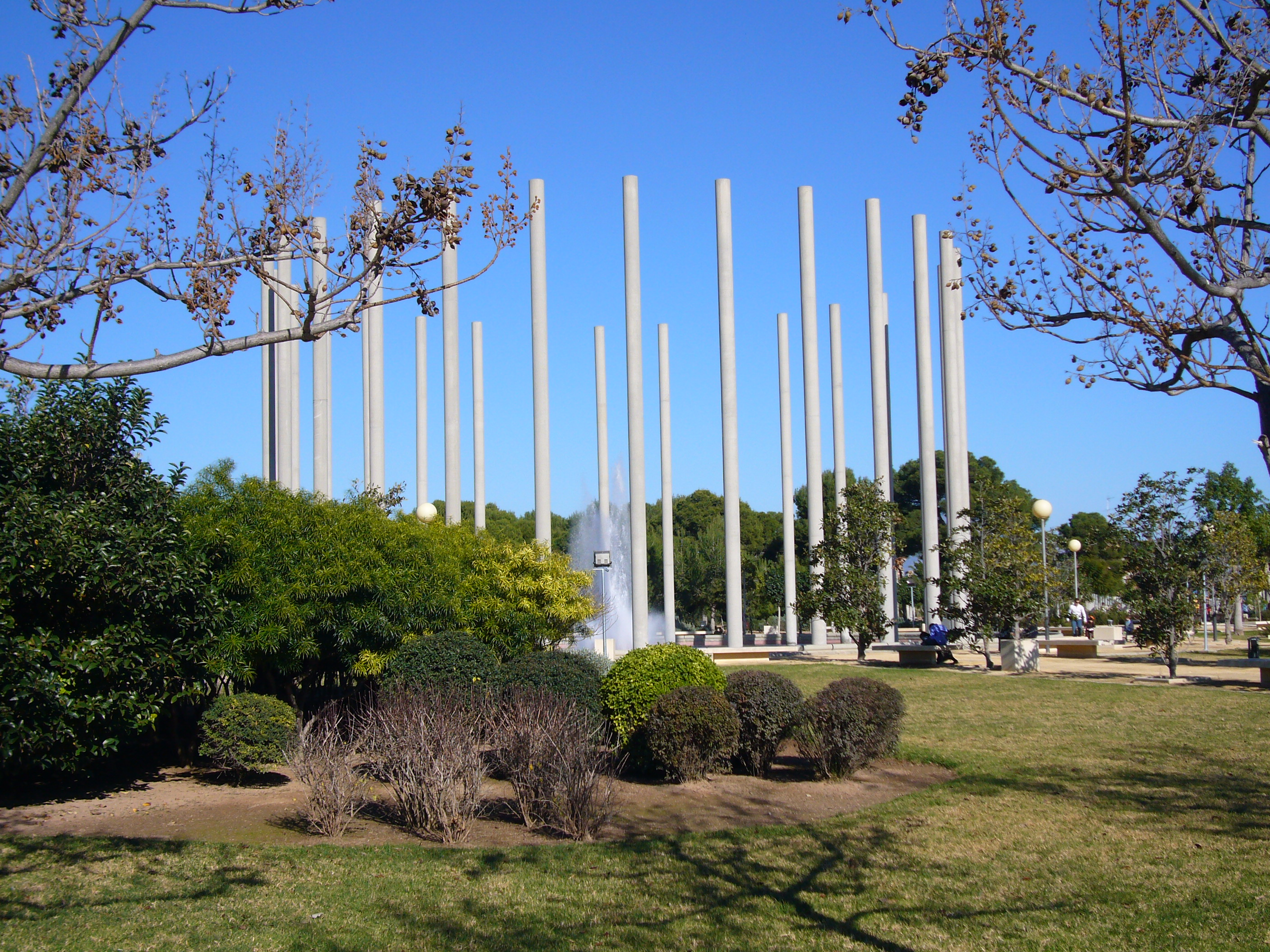 Columnas de la fuente central del Parque Huerto Lo Torrent de San Vicente del Raspeig.